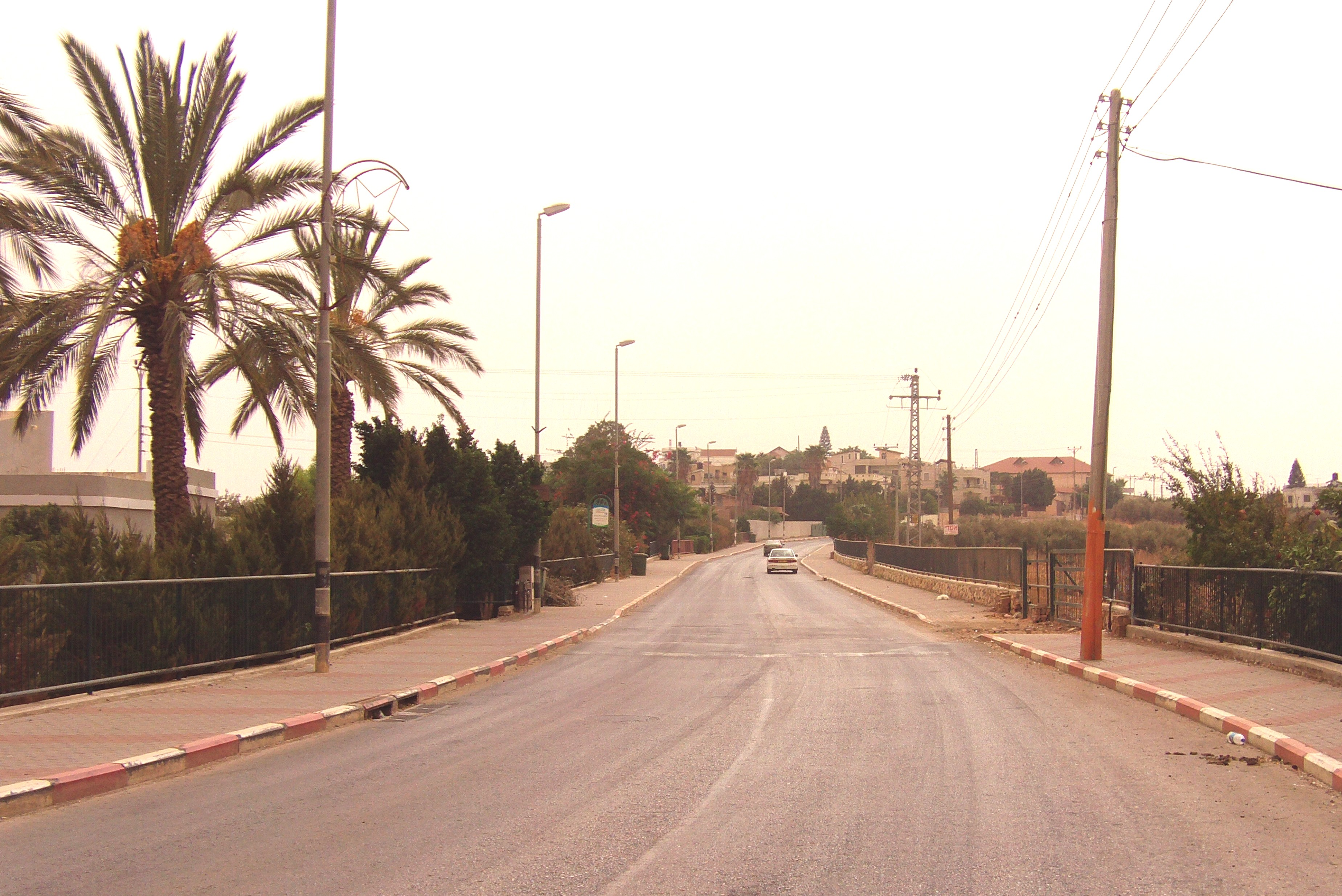 טובא זנגריה כפר בדווי בגליל רחוב ביישוב